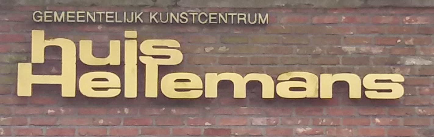 Huis Hellemans - naamplaat